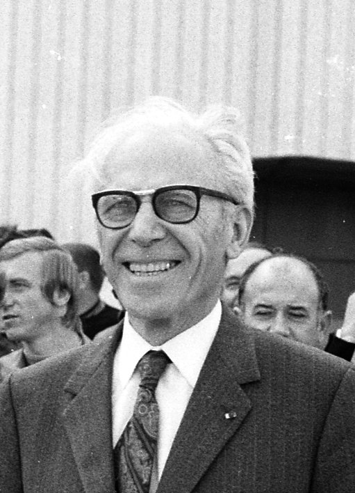 Blagnac, en bordure des pistes. 28 octobre 1972. plan 3/4 de face d'un groupe de personnes ; au 1er plan l'épouse et les enfants de Bernard Ziegler (un des pilotes de l'équipage du vol d'essai) et Henri Ziegler (père du pilote et Président de la Société Nationale et Industrielle de l'Aérospatiale). Cliché pris lors du 1er vol d'essai de l'avion Airbus A300 B.